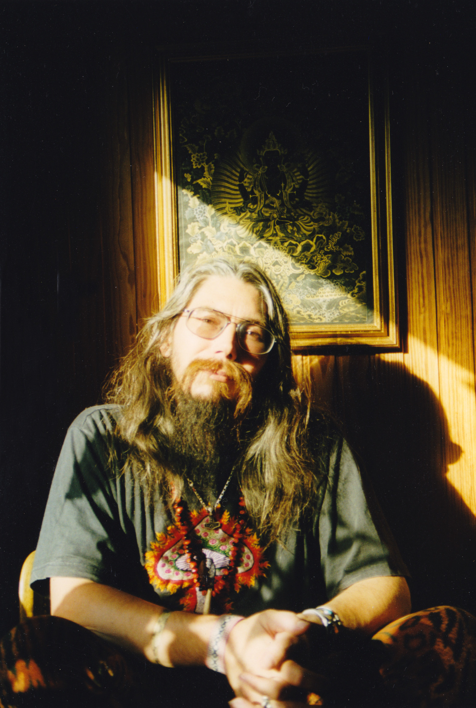 Der Ethnobotaniker Christian Rätsch im Jahr 1999